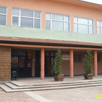 Читалище „Пробуда - 1908“ в с. Дълбок извор. Сградата е построена през 1969 г.